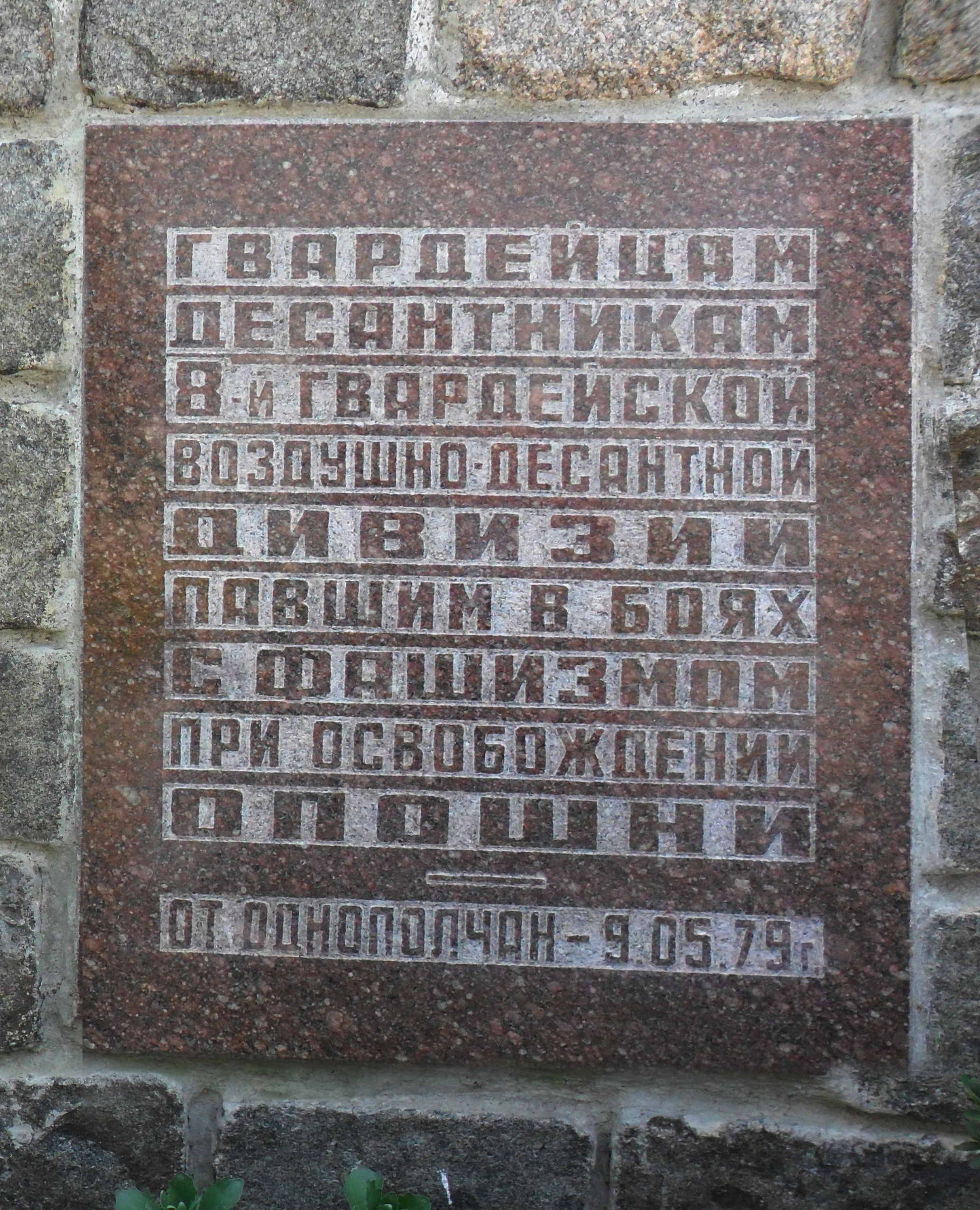 Пам"ятна дошка полеглим в боях за визволення Опішнів роки Німецько-радянської війни